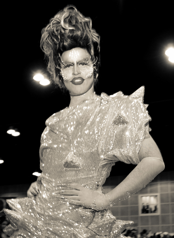 Rupaul DragCon 2019 - Los Angeles